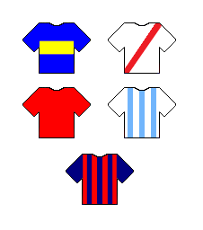 Las camisetas de los cinco grandes.